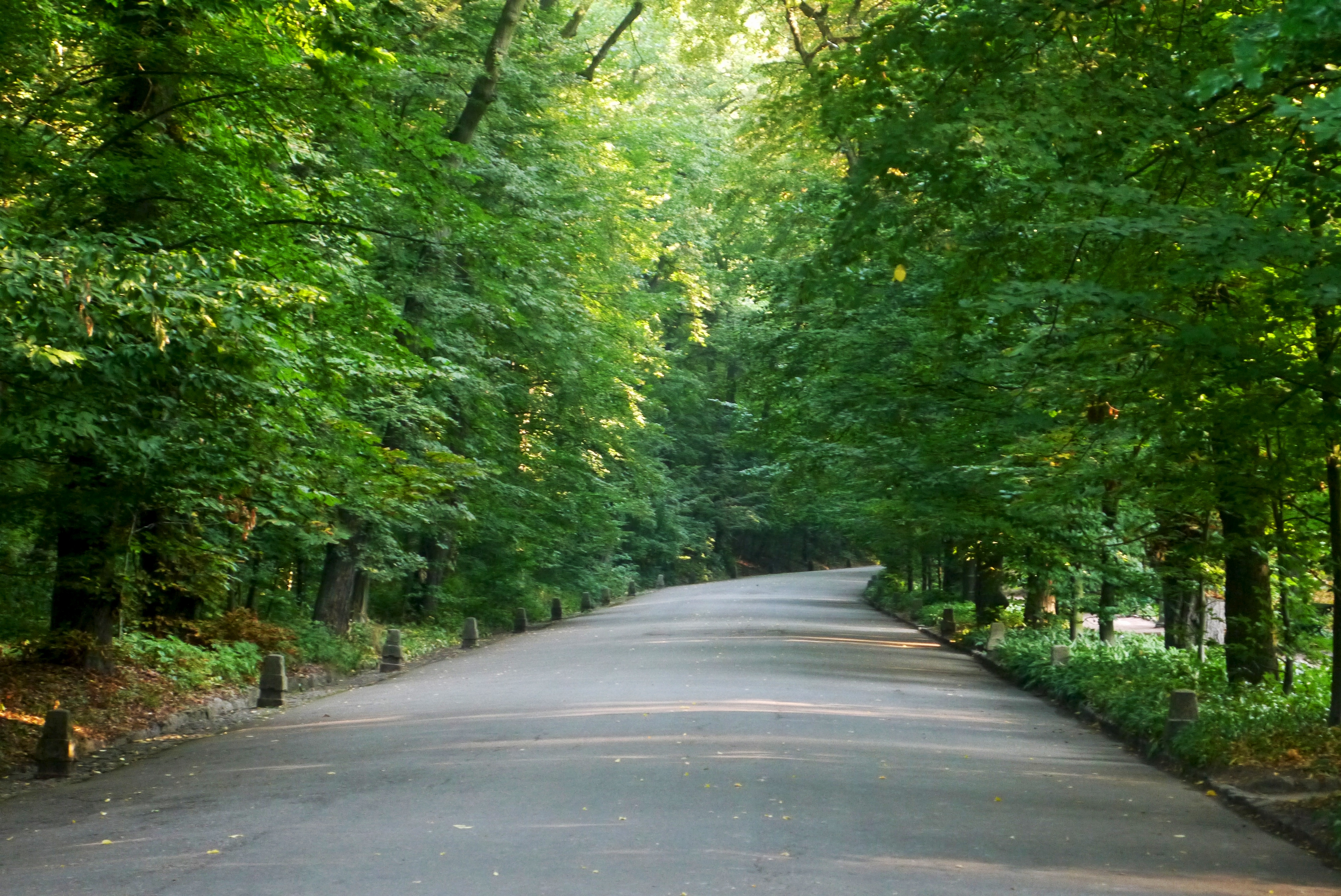 1.2. Головна алея, Умань, вул. Садова, 55 (парк «Софіївка»)